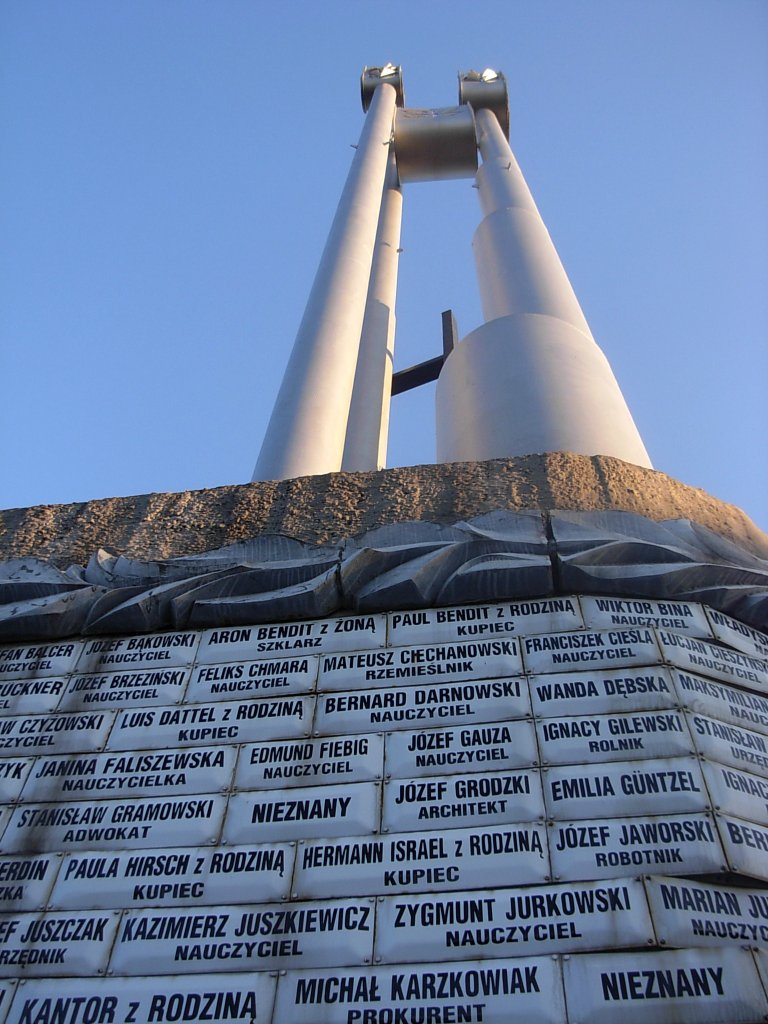 Sanktuarium Królowej Męczenników, Kalwaria bydgoska - Golgota XX wieku, pomnik poległych ku czci zamordowanych w Dolinie Śmierci w Bydgoszczy-Fordonie